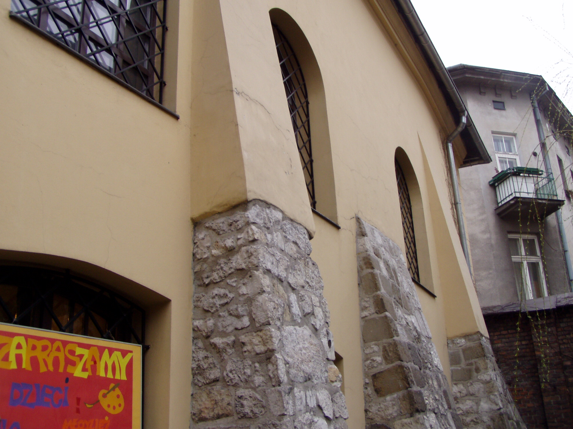 Synagoga Poppera w Krakowie